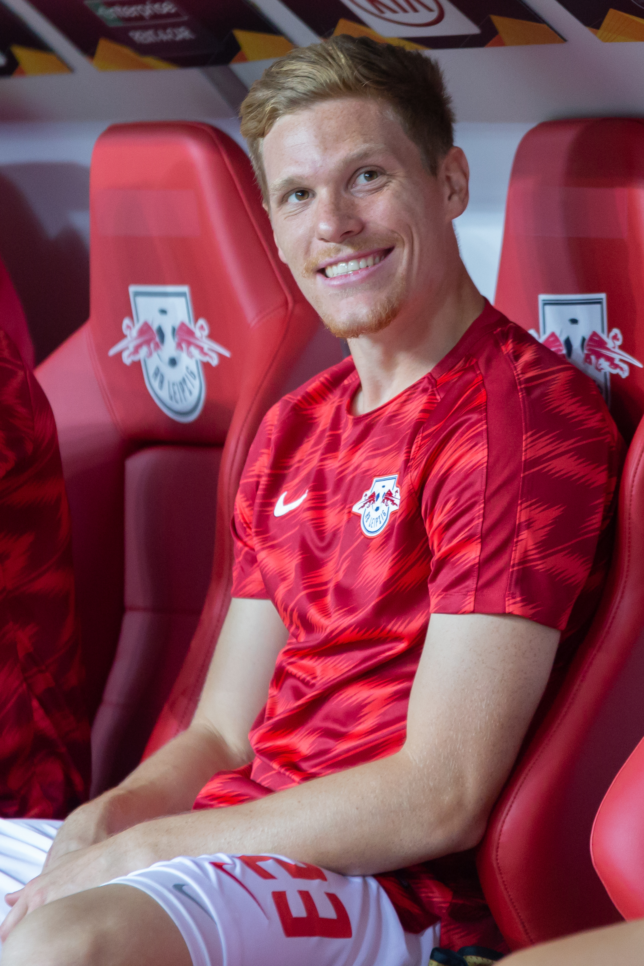 Marcel Halstenberg (RB Leipzig, 23); Porträt, Einzelbild